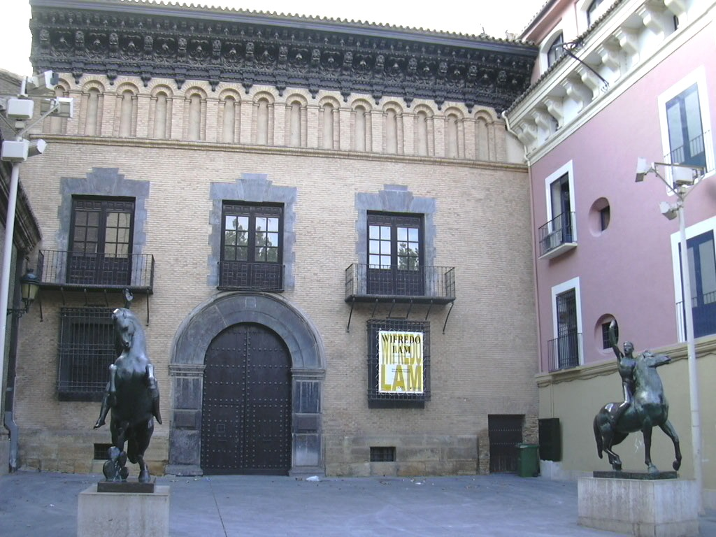 Zaragoza - Museo Pablo Gargallo - Casa renacentista aragonesa construida entre 1659 y 1661